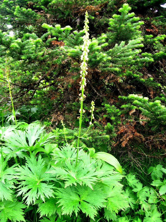 Цветущий борец саянский. Западный Саян, хребет Кулумыс.